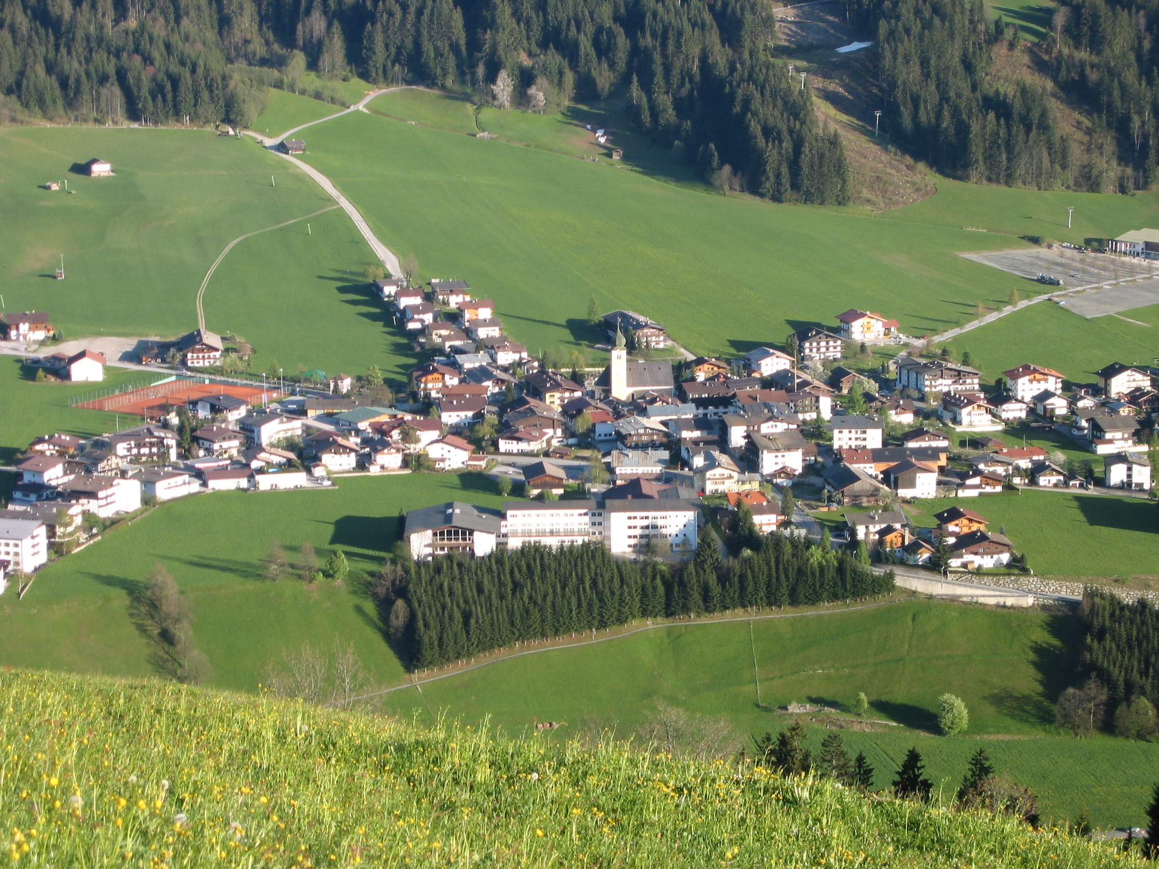 Blick vom Salvenberg auf das Dorfzentrum von Westendorf/Tirol